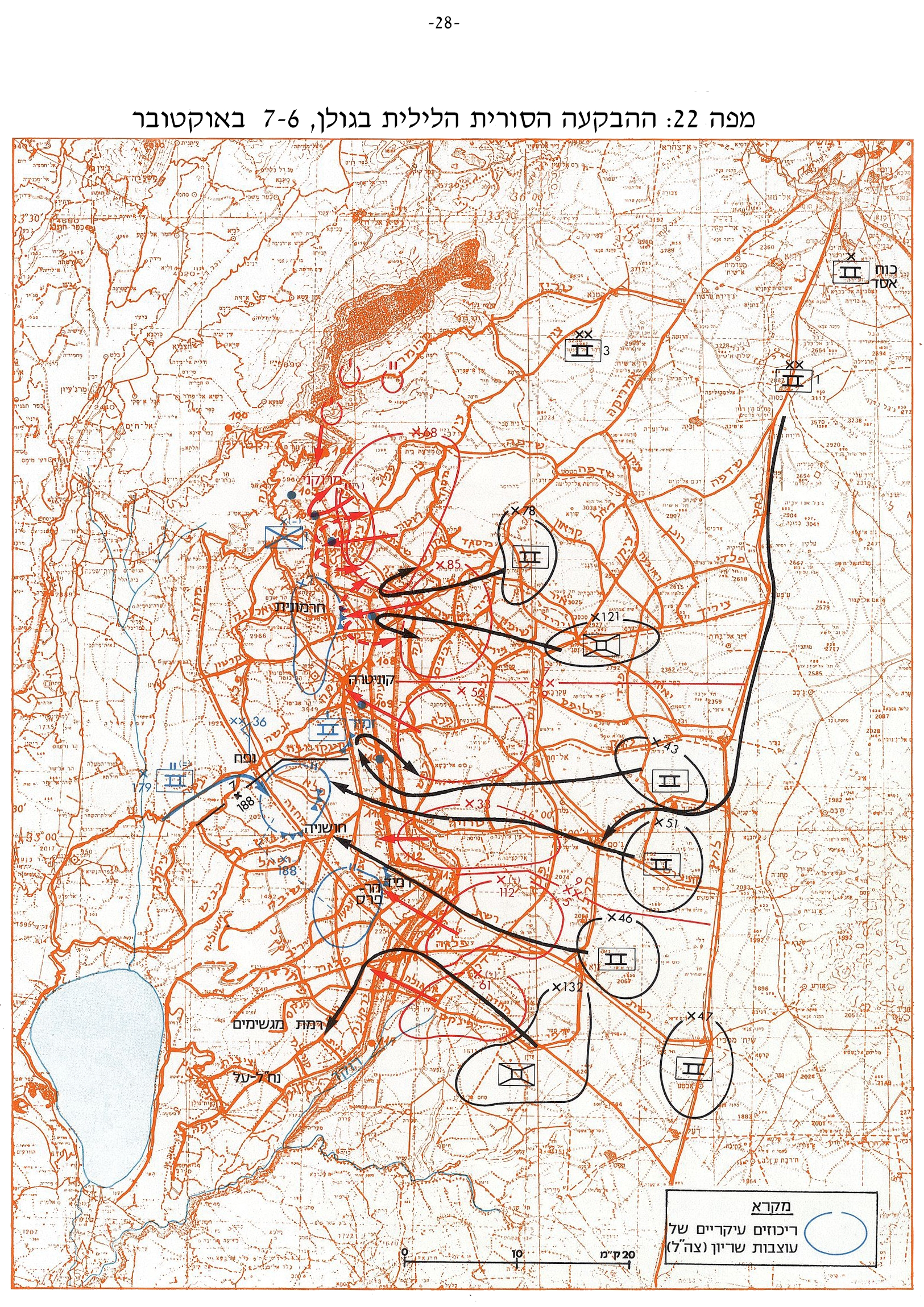 מפה 22 - ההבקעה הסורית הלילית בגולן, 6-7 באוקטובר - מלחמת יום הכיפורים